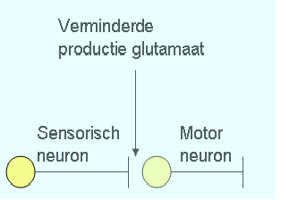 Veranderingen in de synaps tussen een sensorisch en motor neuron in Aplysia bij habituatie. Afname van glutamaat in het presypaptisch neuron leidt tot afsluiten van Calcium kanalen aldaar. Dit leidt tot verminderde overdracht van het signaal naar het postsynaptisch neuron. Eigen werk.